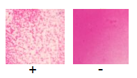 Test Rosa de Bengala contra la Brucel·losi